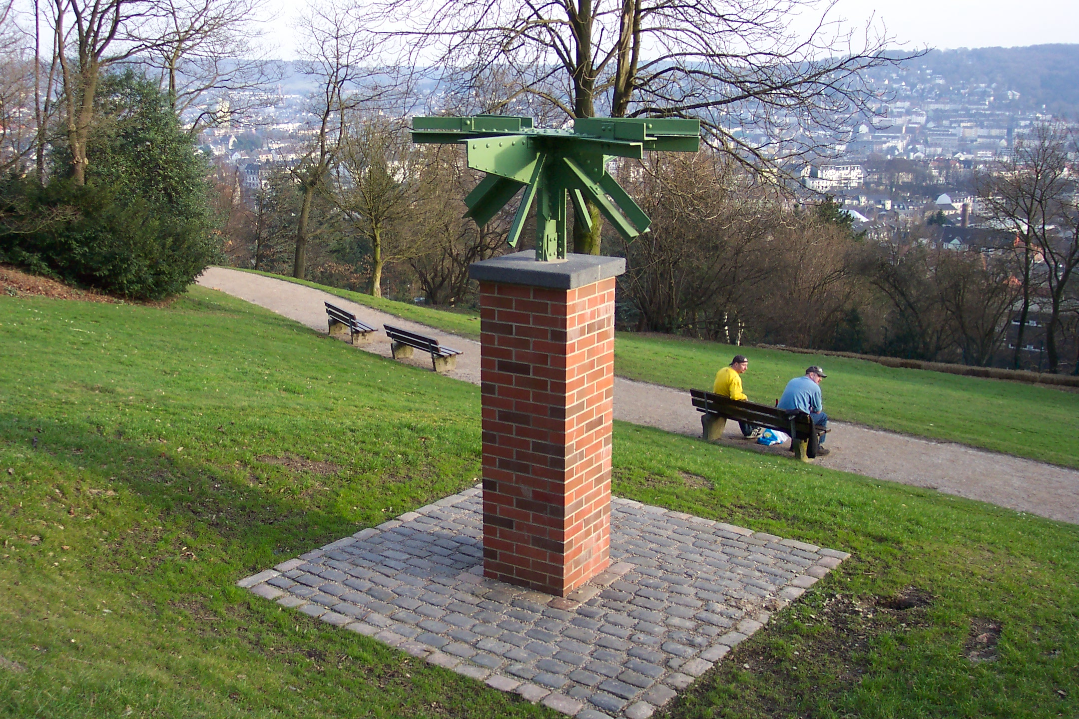 Nordpark, Wuppertal